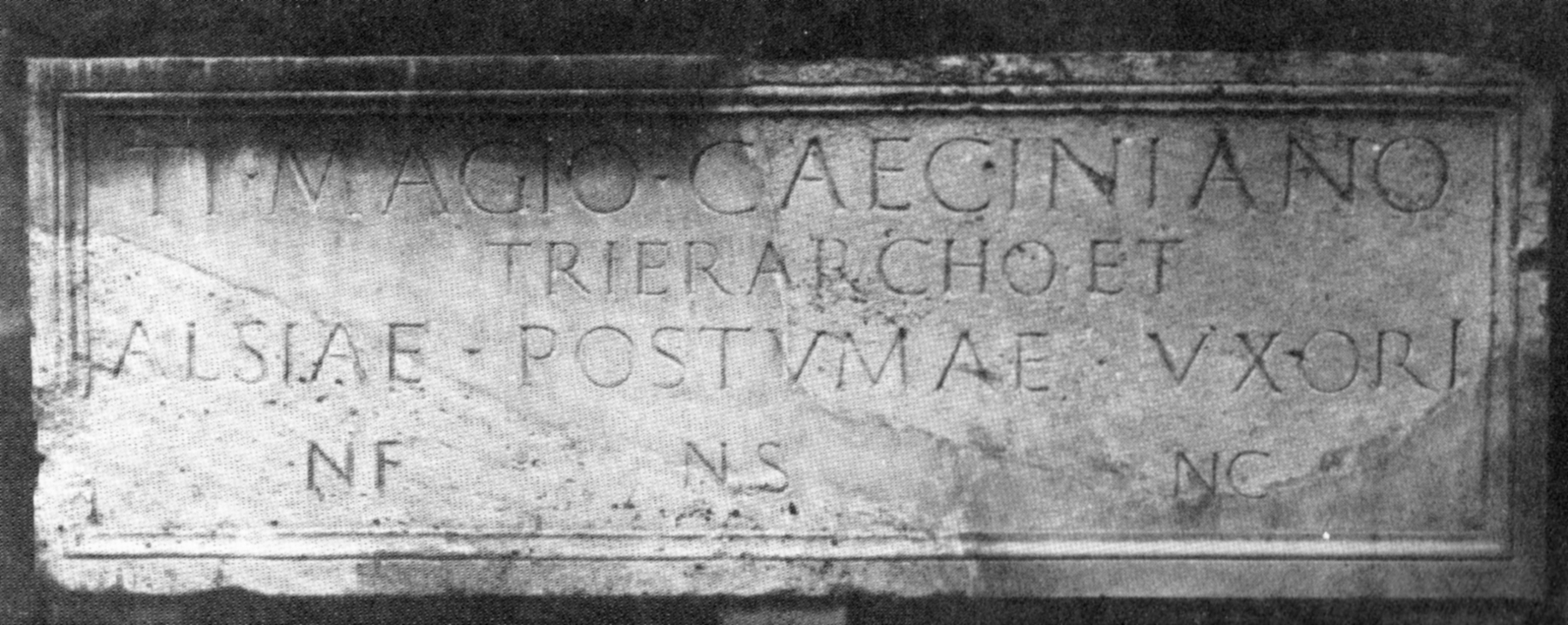 Sarcofago di Tiberio Magio Caeciniano, rinvenuto ad Ospedaletto di Gemona del Friuli, presso il Priorato di Santo Spirito